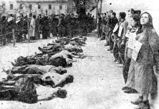 Nemci mučijo in sramotijo ujete partizane v Celju leta 1942.